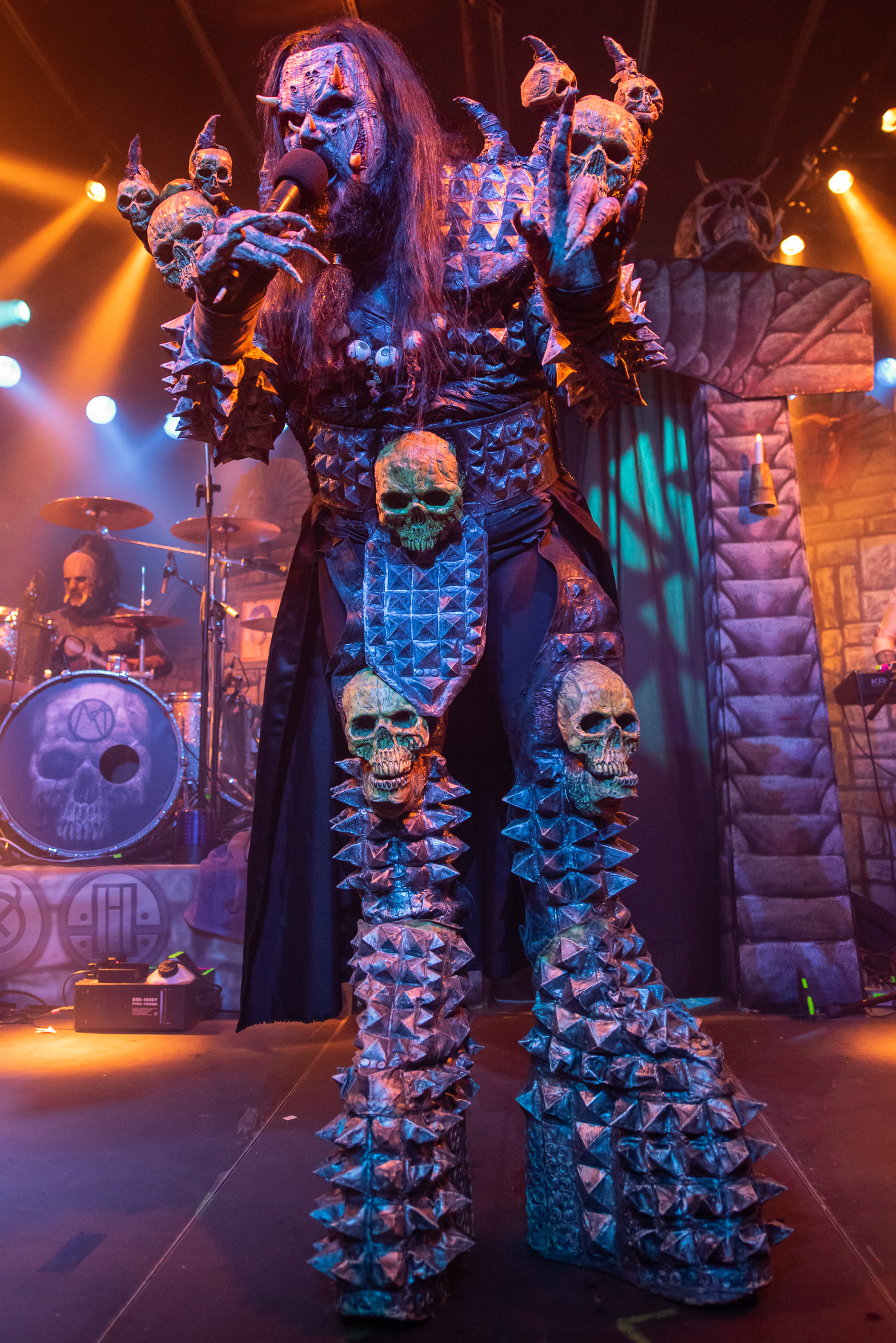 Concertbüro Franken,Der Hirsch,Konzert,Livekonzert,Livemusik,Lordi,Mr. Lordi,Musik,Tomi Petteri Putaansuu